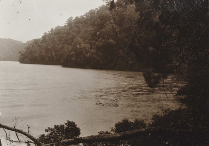 Foto. Het meer Laut Kawar in de Karolanden, Sumatra`s Oostkust